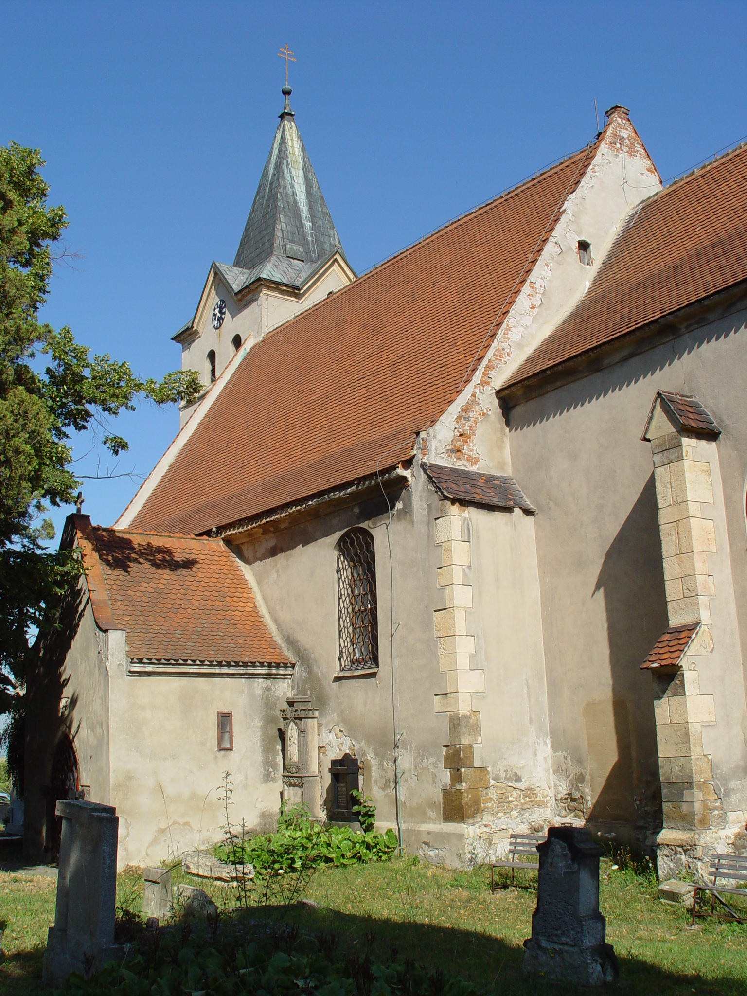 Kostel sv. Vavřince (Havraň), návrší, J od obce, Havraň